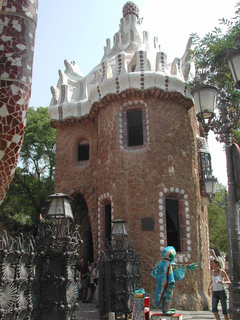 Parc Güell - Tuerm an der Entrée